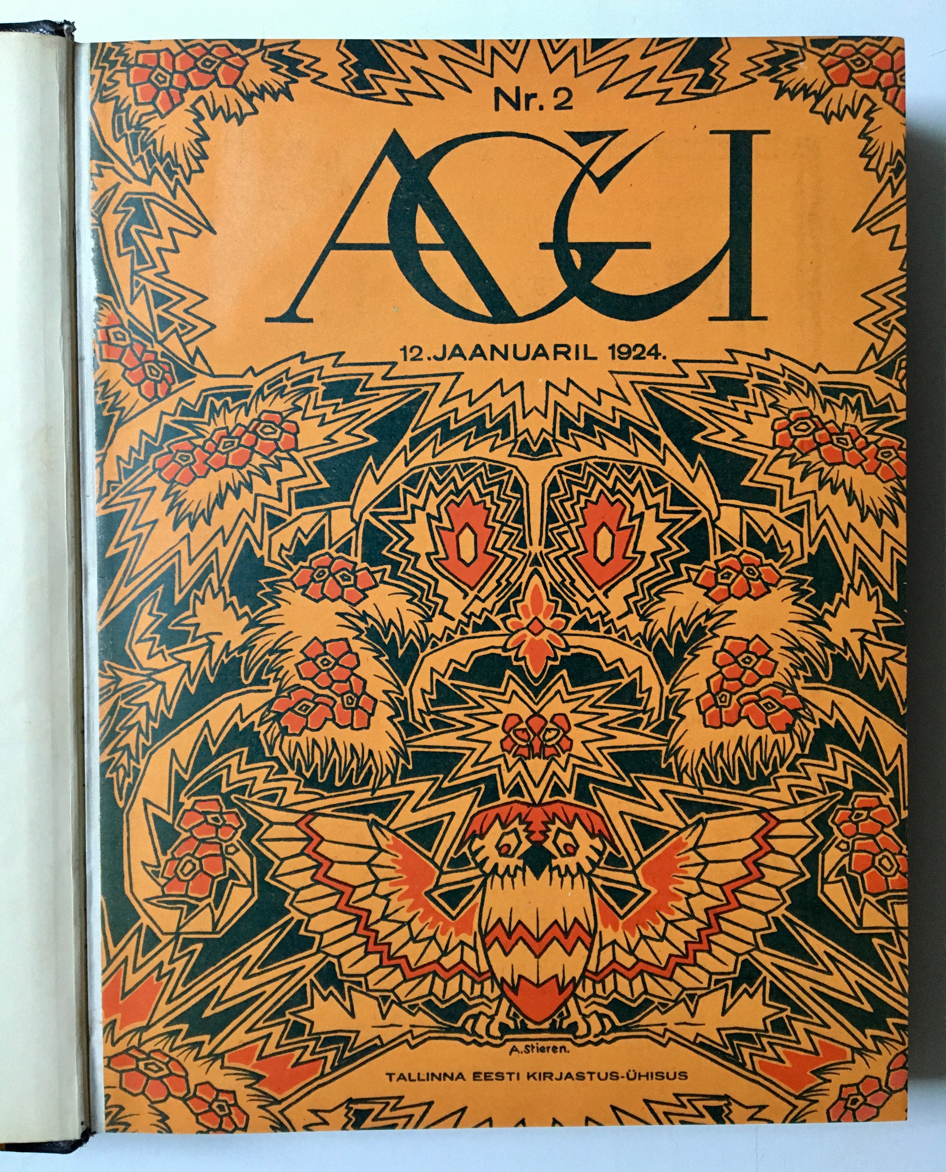 Ajakirja Agu 1924 aasta kujundus Stierenilt